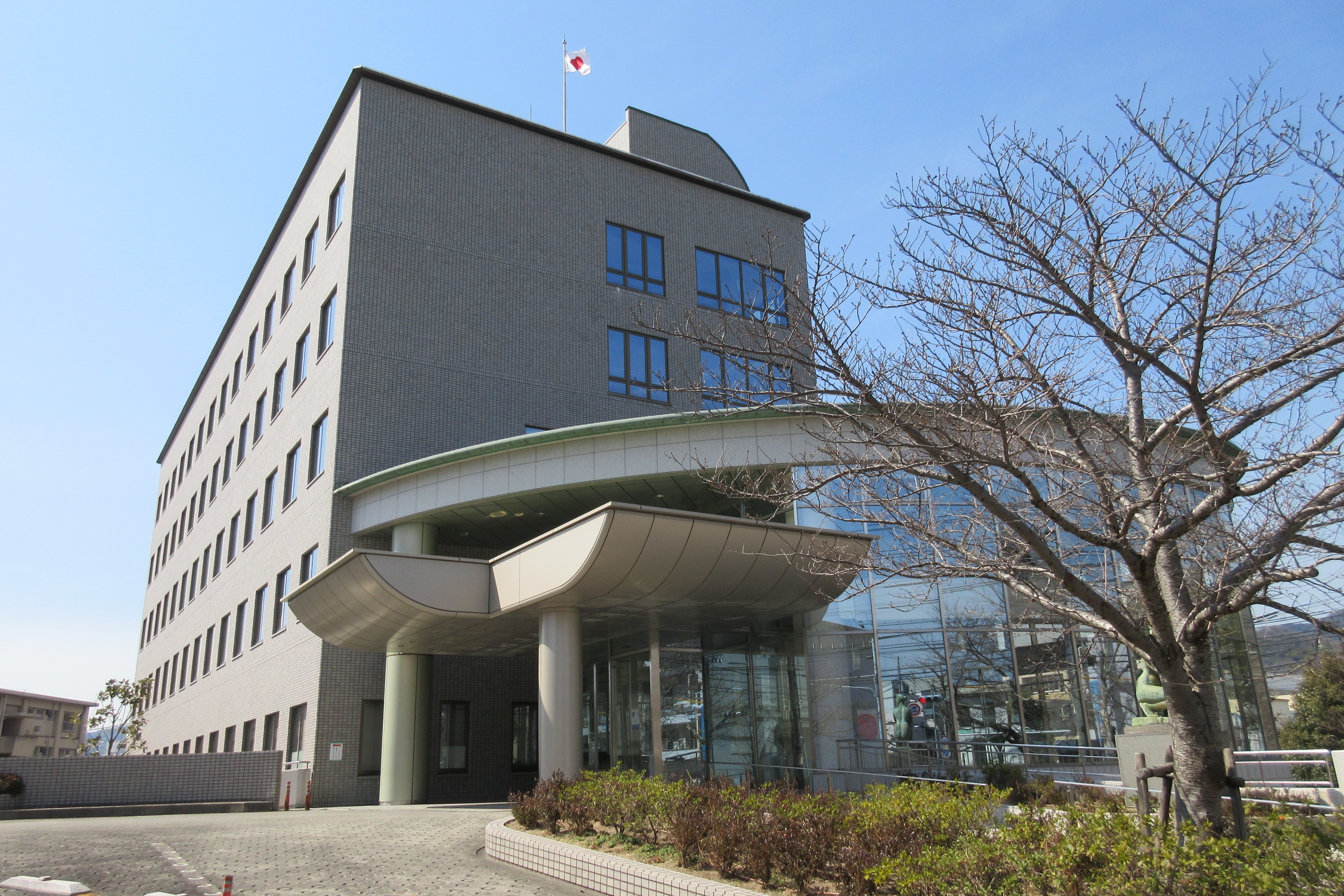 神戸家庭裁判所